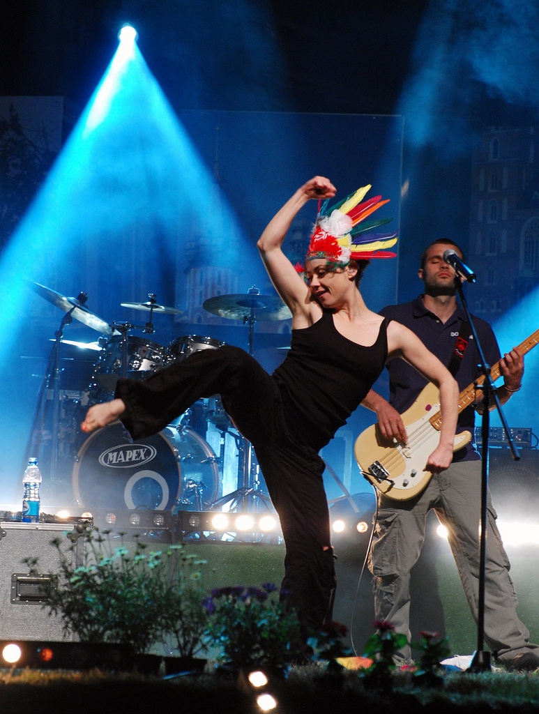 Maria Peszek